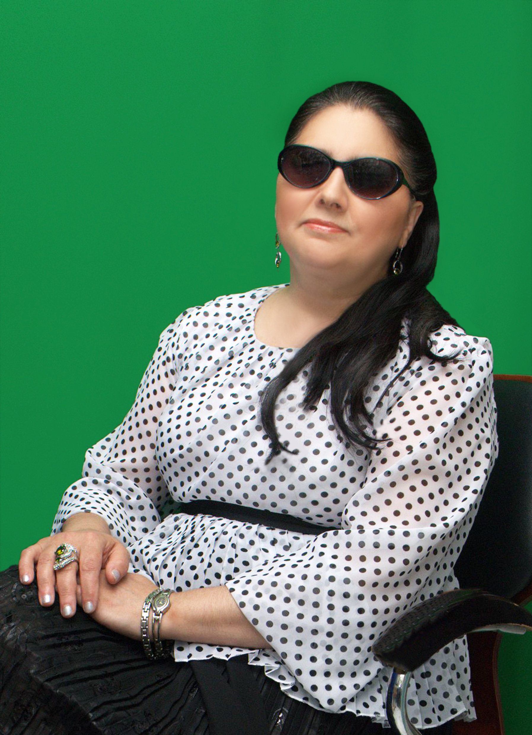 Adı: ÜLKƏR Təxəllüsü: ATƏŞ Doğum tarixi: 01.04.1963 Doğulduğu yer: Azərbaycan, Gədəbəy